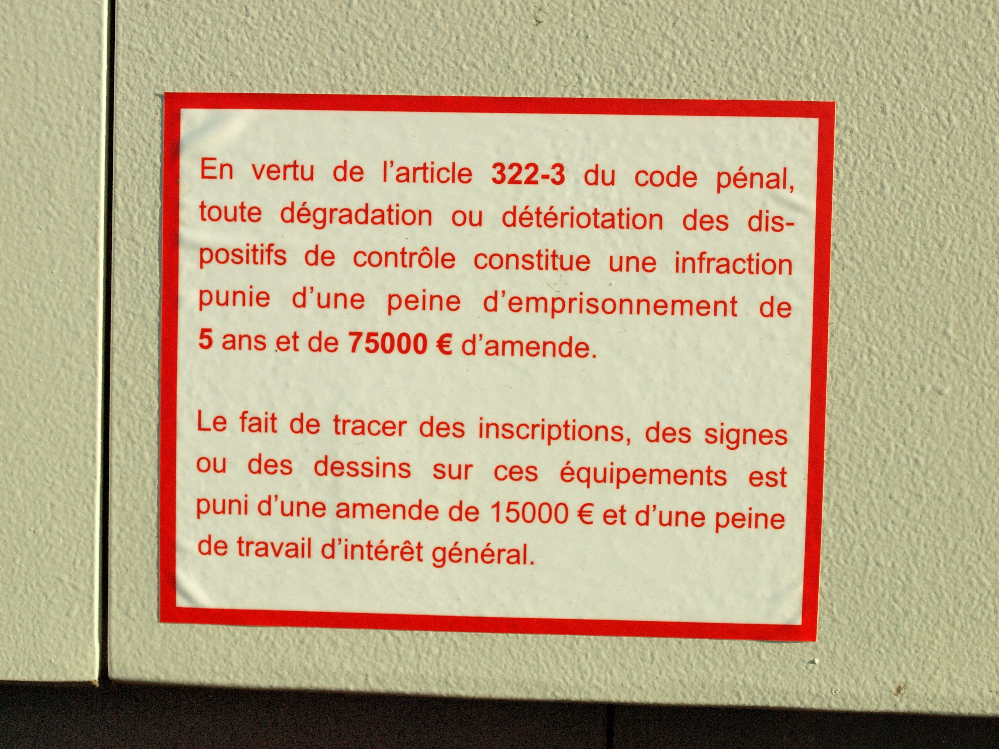 Sur un cinémomètre routier déplaçable à la sortie de Souain (Marne, France), vers Navarin : rappel du code pénal à qui voudrait saccager l'objet.